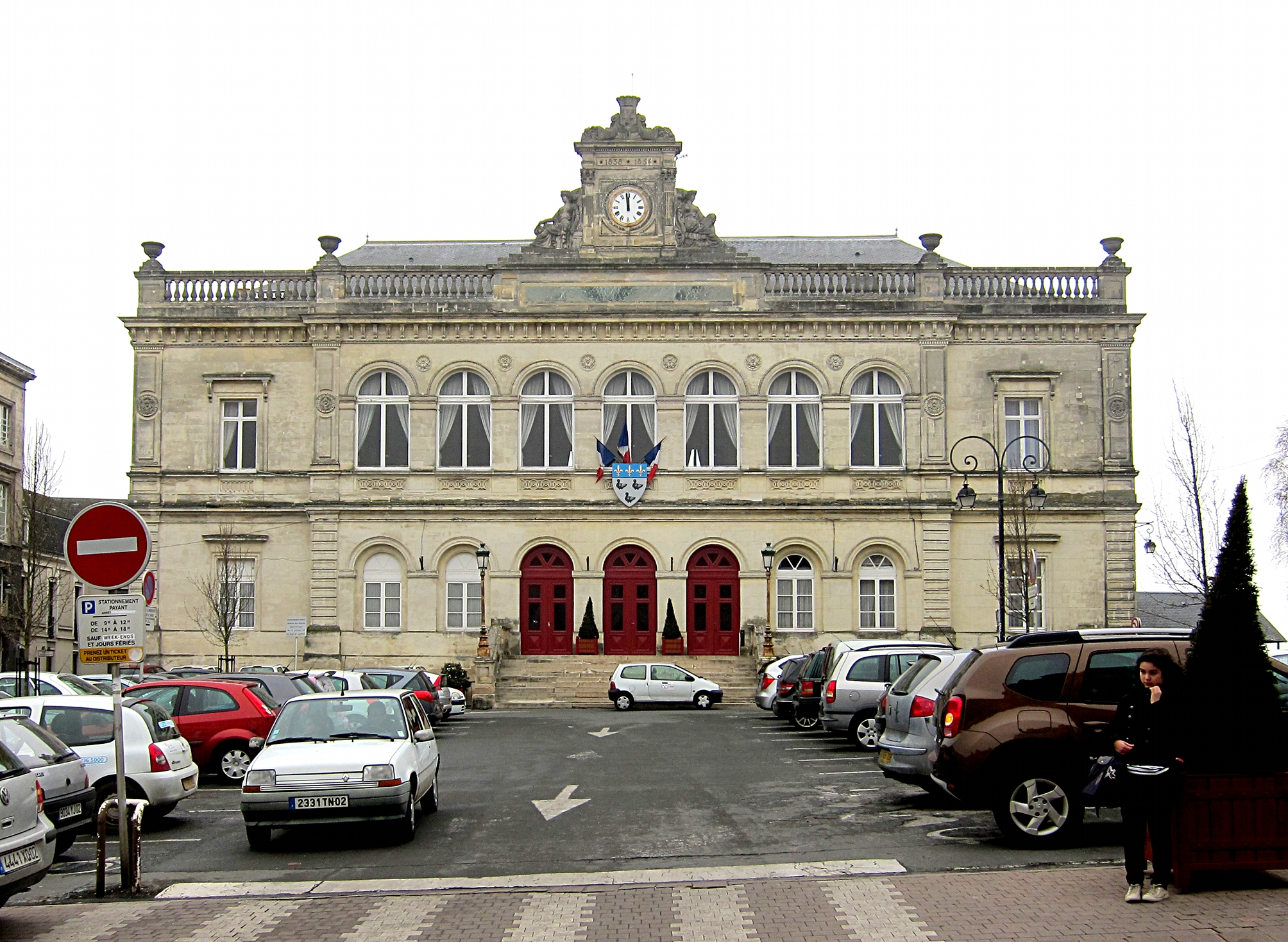 L'hôtel de ville de Laon (Aisne).